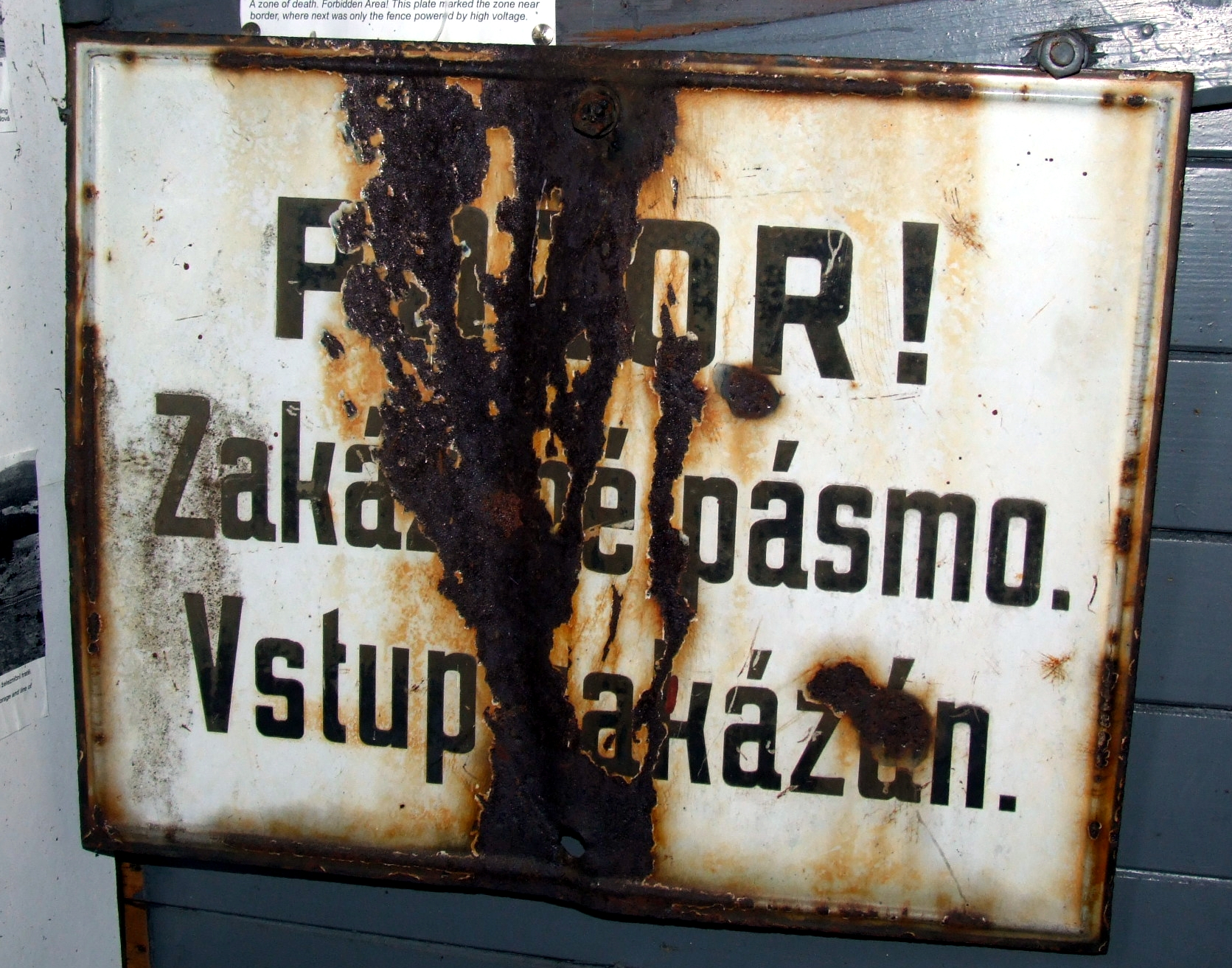 Pozor! Tabule v muzeum v Novém Údolí